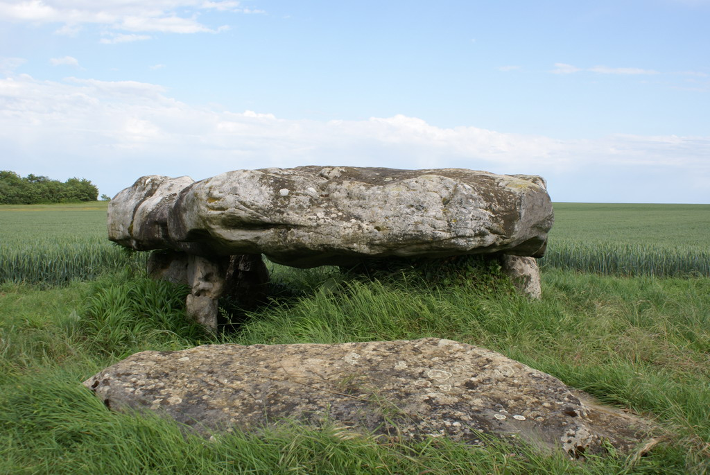 Dolmen dit la Pierre Larmoire (Rumont, Seine et Marne, région Île-de-France).